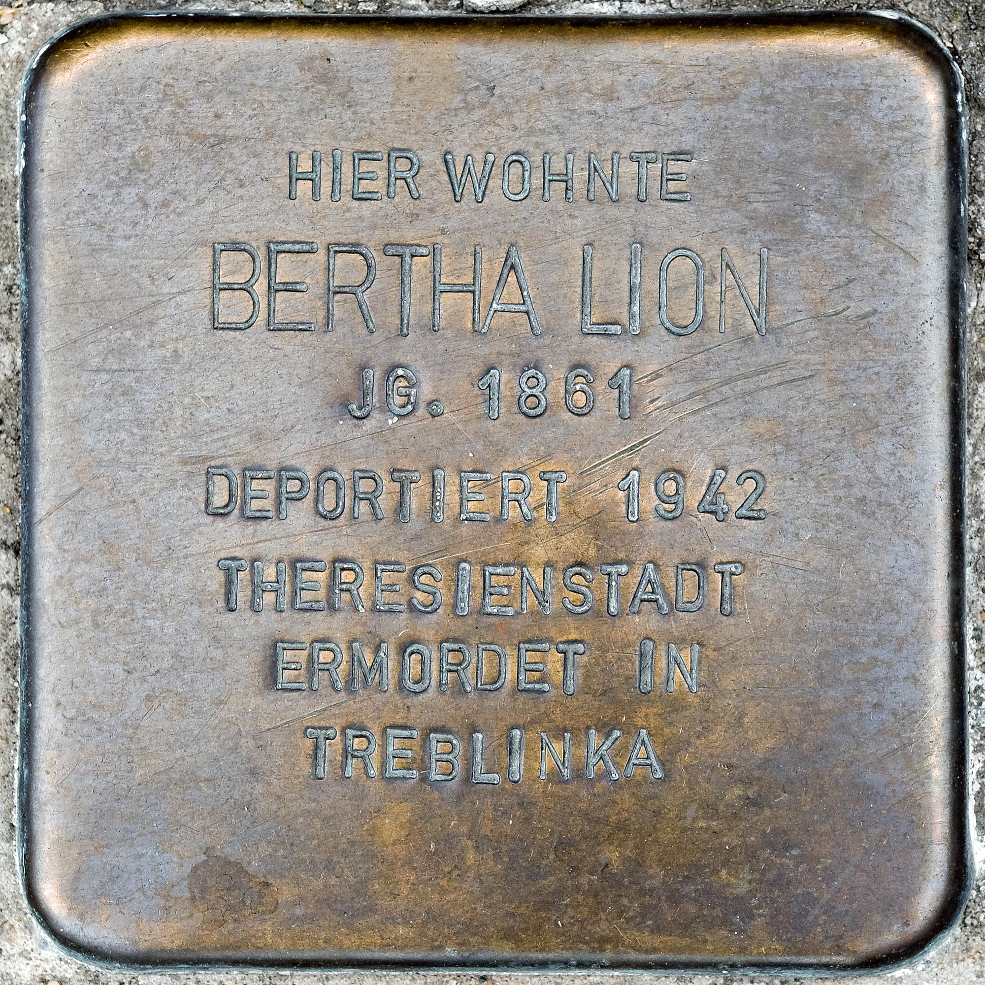 Stolperstein Lion, Bertha